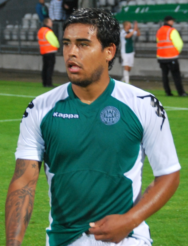 Fodboldspiller Danilo Arrieta fra Viborg FF. Her under en kamp i 1. division imellem Viborg FF og FC Fyn på Viborg Stadion.